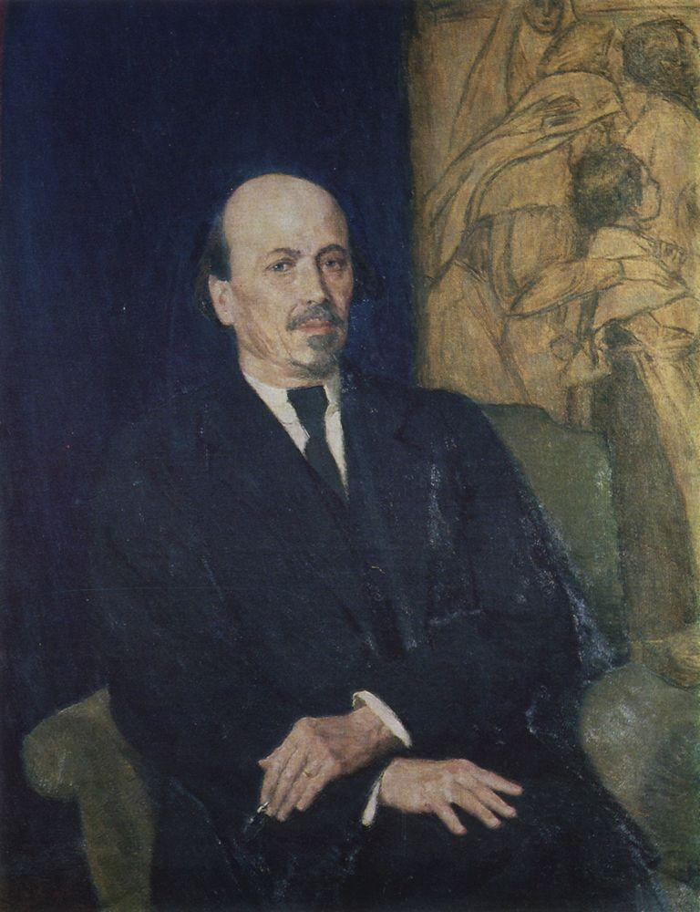 Портрет М.В.Нестерова